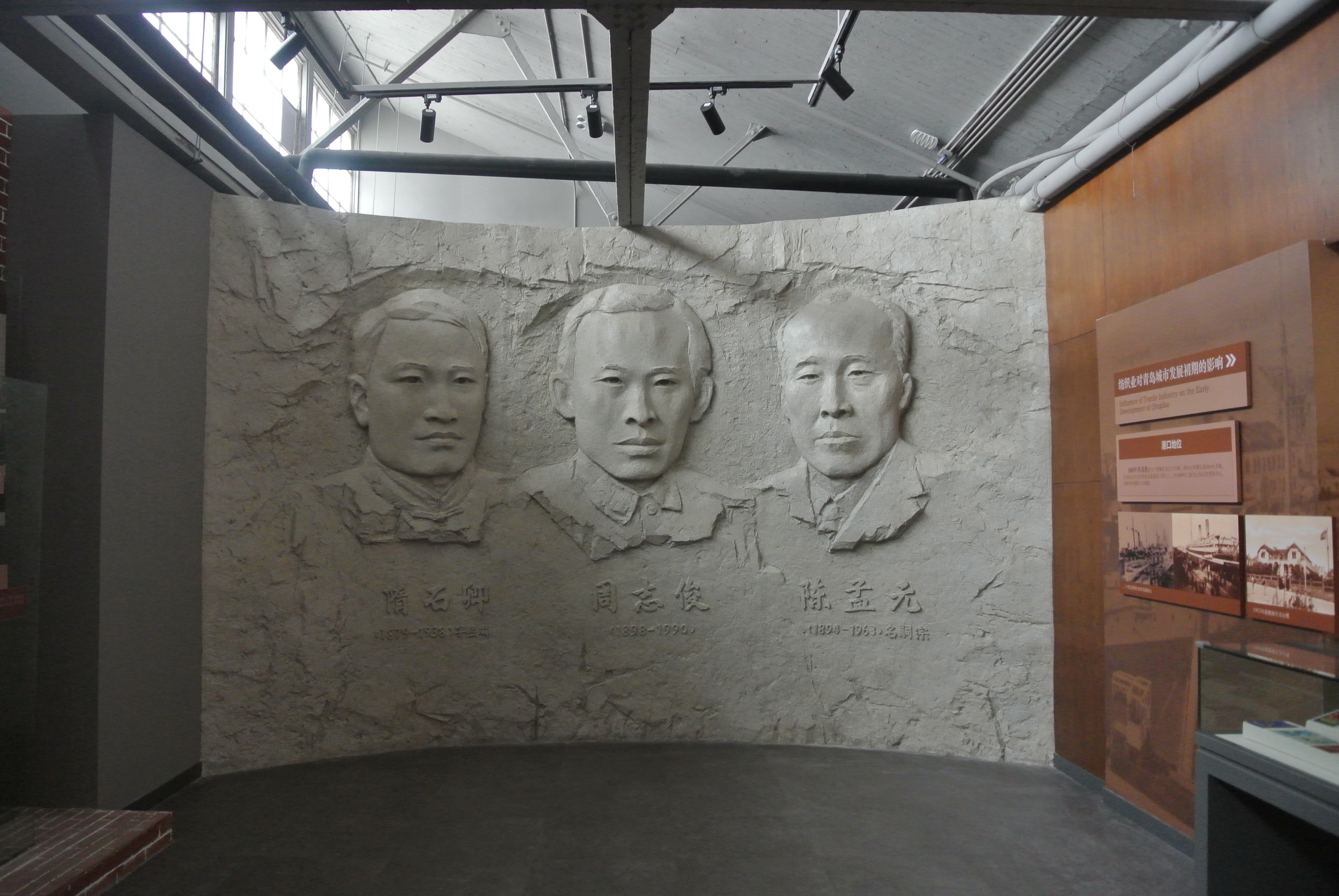 青岛纺织博物馆 隋石卿 周志俊 陈孟元像